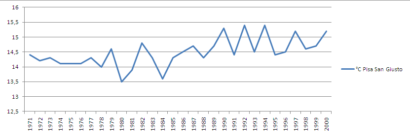 Stazione meteorologica di Pisa San Giusto: andamento della temperatura media annua dal 1971 al 2000